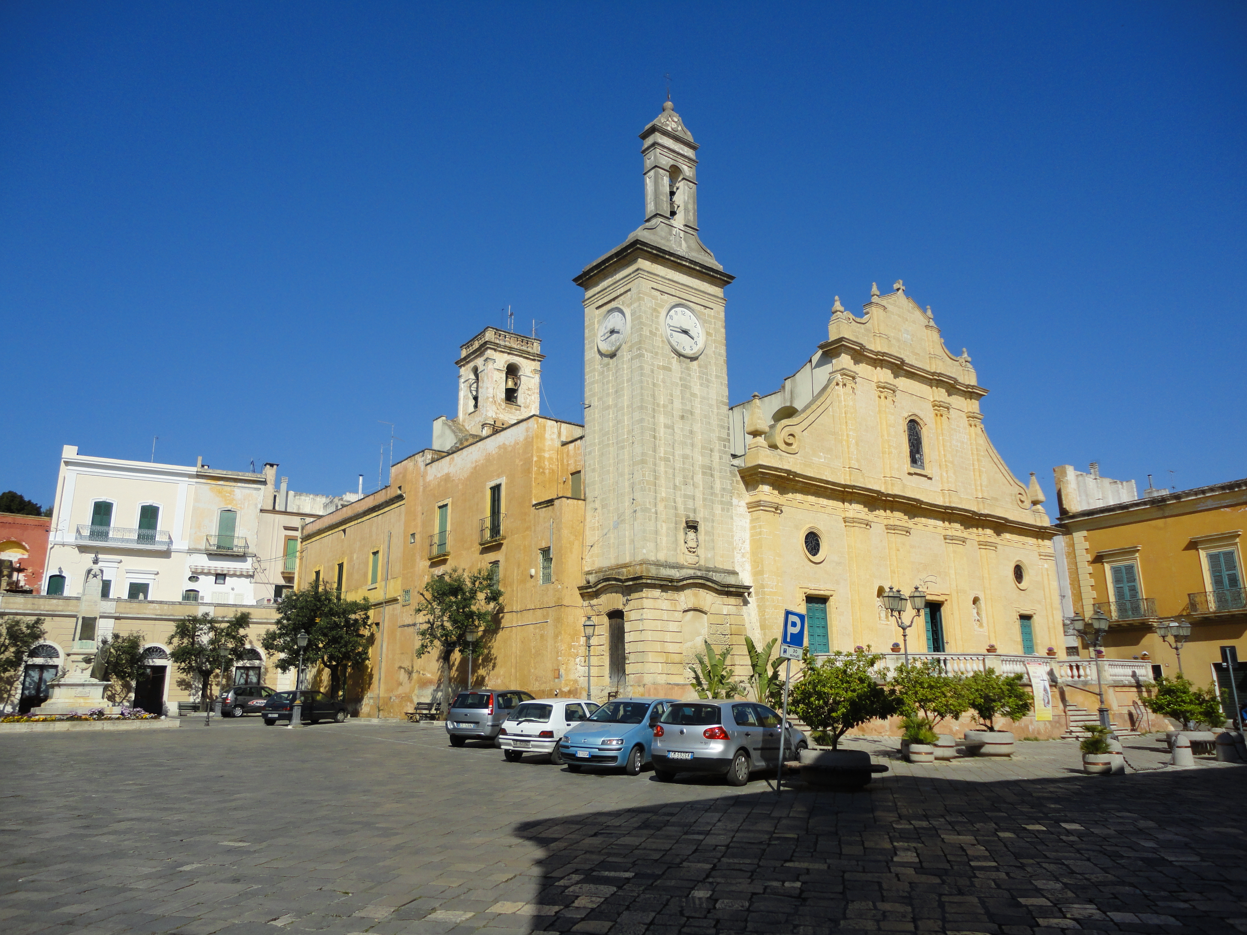 Piazza Giuseppe Garibaldi Tuglie, Lecce